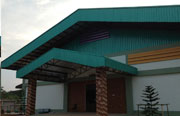 อาคาร-10